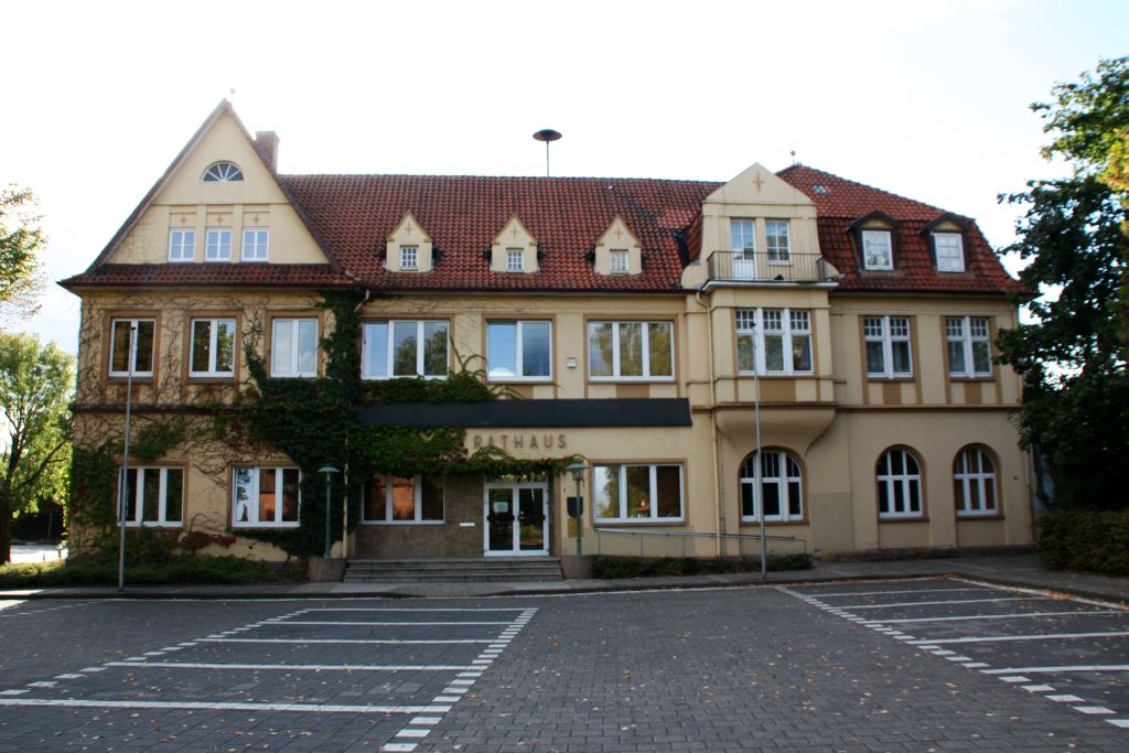 Das Rathaus in Schwarmstedt